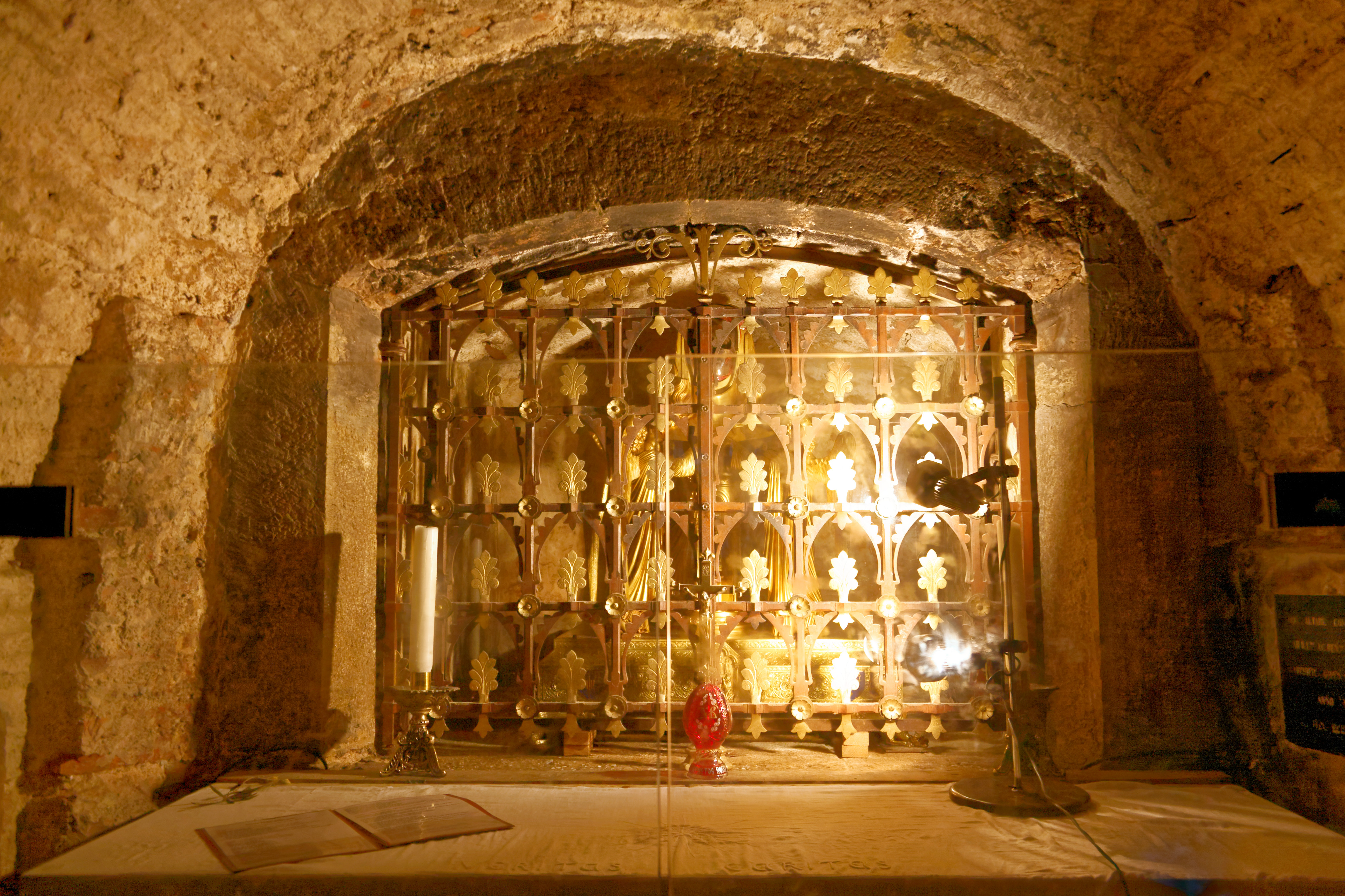 Reliquienschrein der heiligen Maria Magdalena in der Krypta der Basilique Sainte-Marie-Madeleine in Saint-Maximin-la-Sainte-Baume